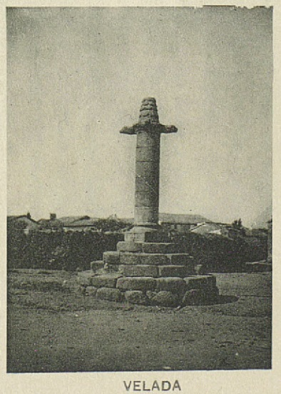 Rollo o picota de Velada